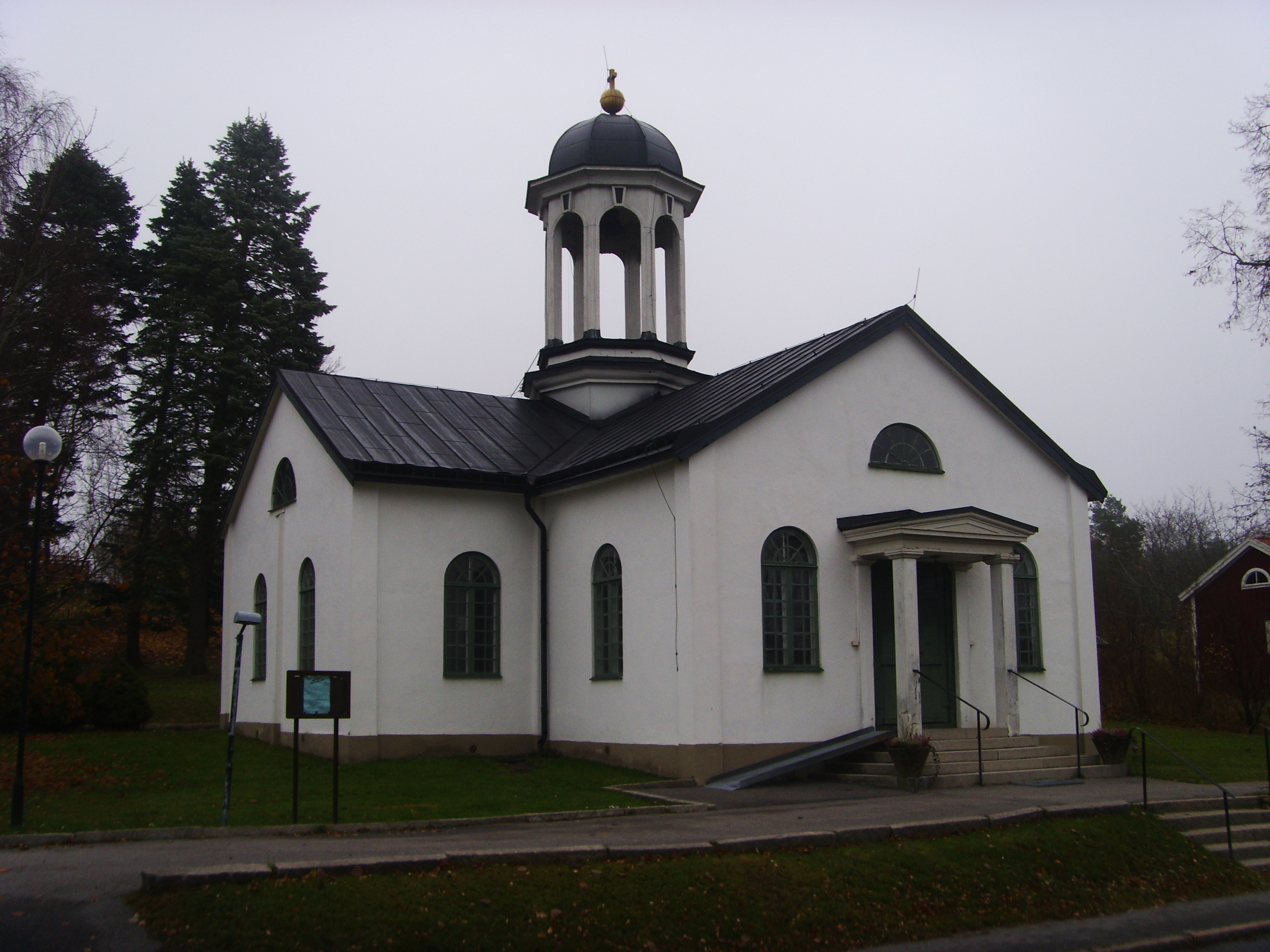 Rejmyre kyrka